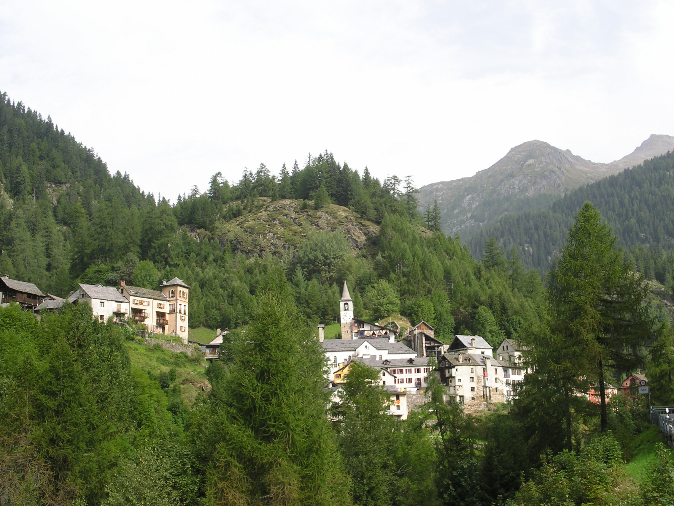 Fusio TI